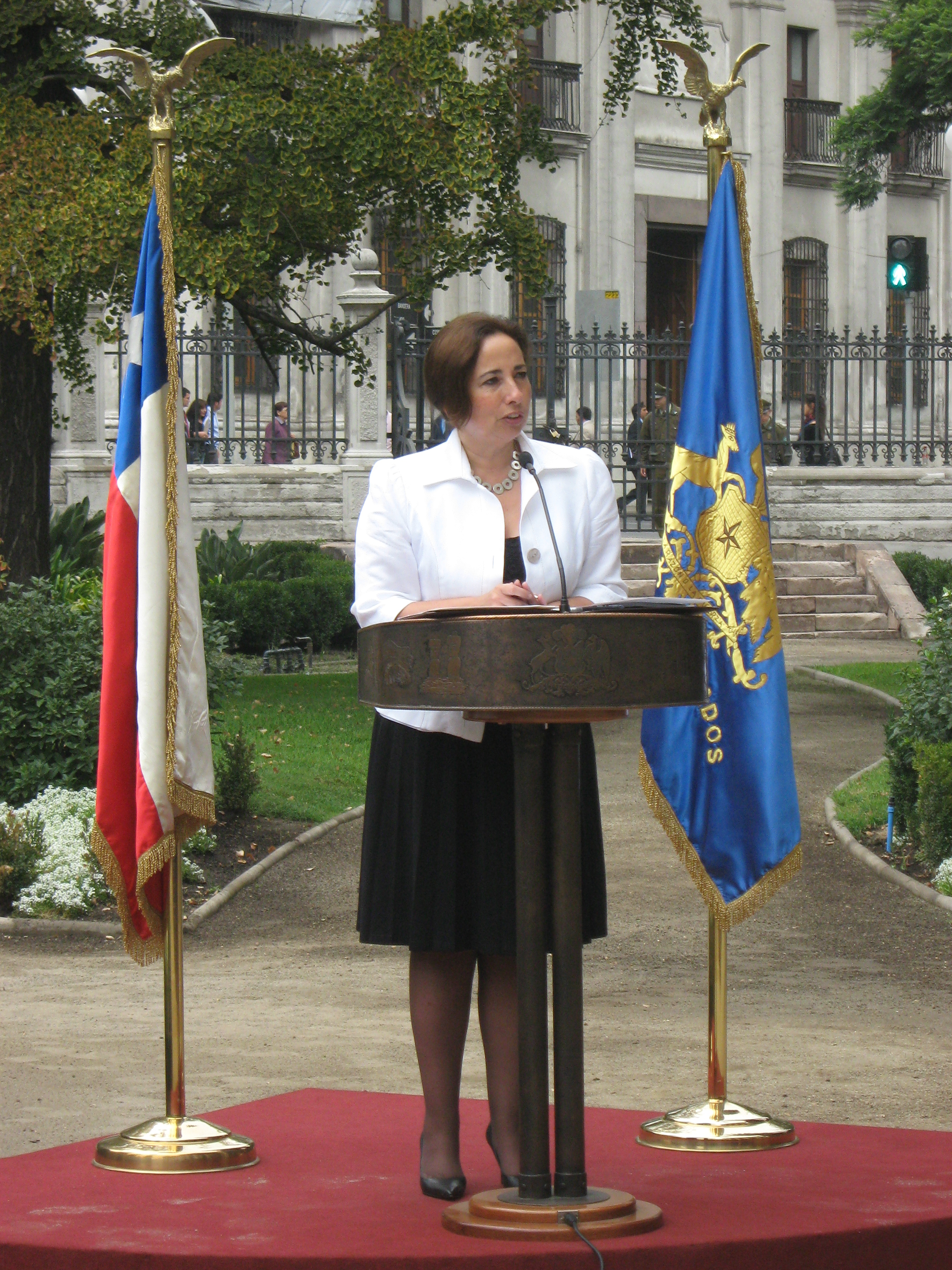 La presidenta de la Cámara de Diputados, Alejandra Sepúlveda, encabezó este viernes 11 de marzo la ceremonia que dio inicio a una nueva tradición en el centro de Santiago: el repique de las campanas de la siniestrada iglesia de la Compañia de Jesús, que resultó destruida por un incendio en 1863 donde actualmente se ubica el edificio del ex Congreso Nacional.